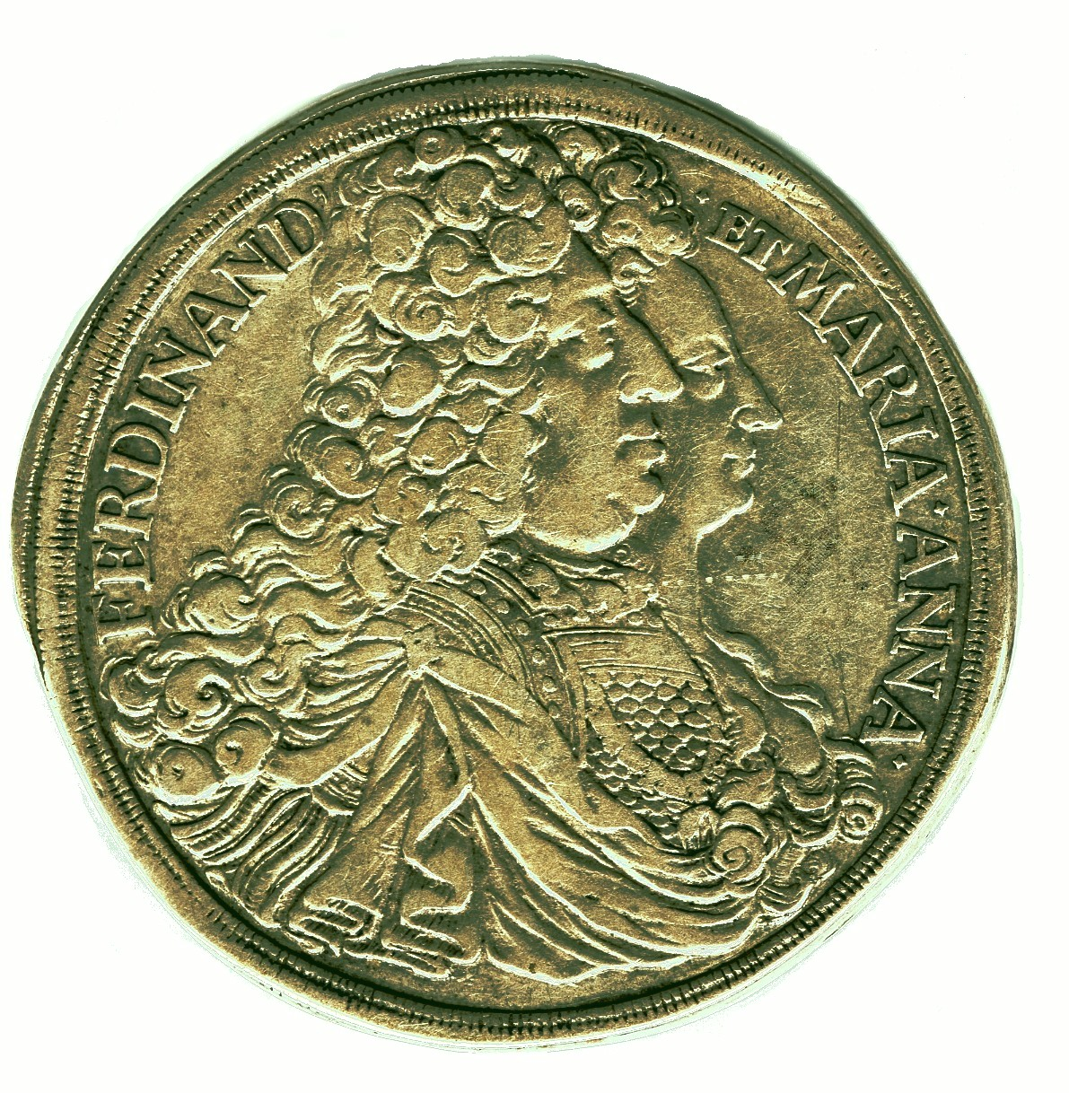 Taler Fürstentum / Principality Schwarzenberg 1696. Vorderseite / Avers. Umschrift/Inscription: FERDINAND' - ET MARIA ANNA. Davenport #7702.